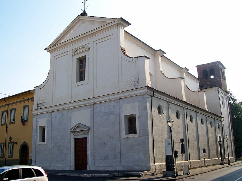 Lucca - Chiesa di S. Ponziano